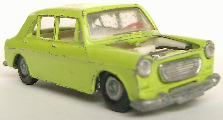 Guisval Morris 1100 uit begin jaren '70